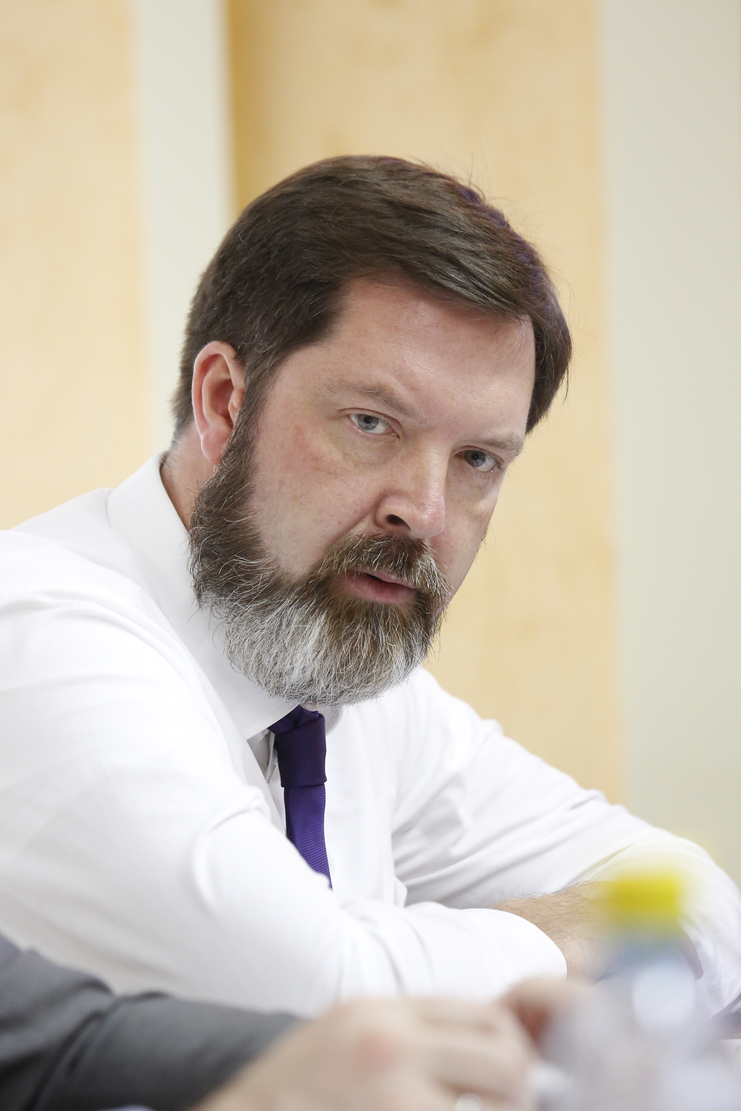 Максим Ксензов